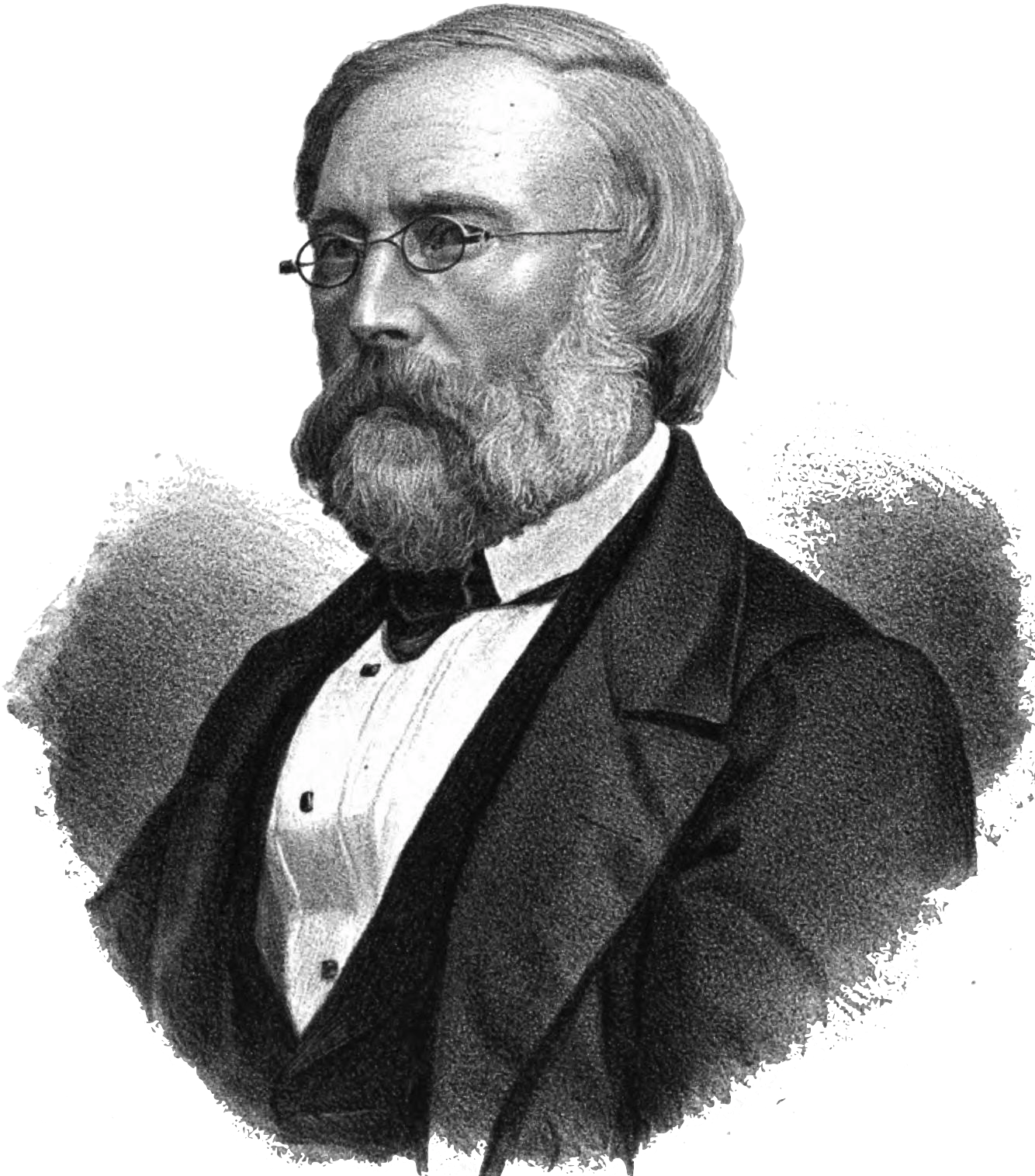 Den svenske målaren Gustaf Wilhelm Palm.